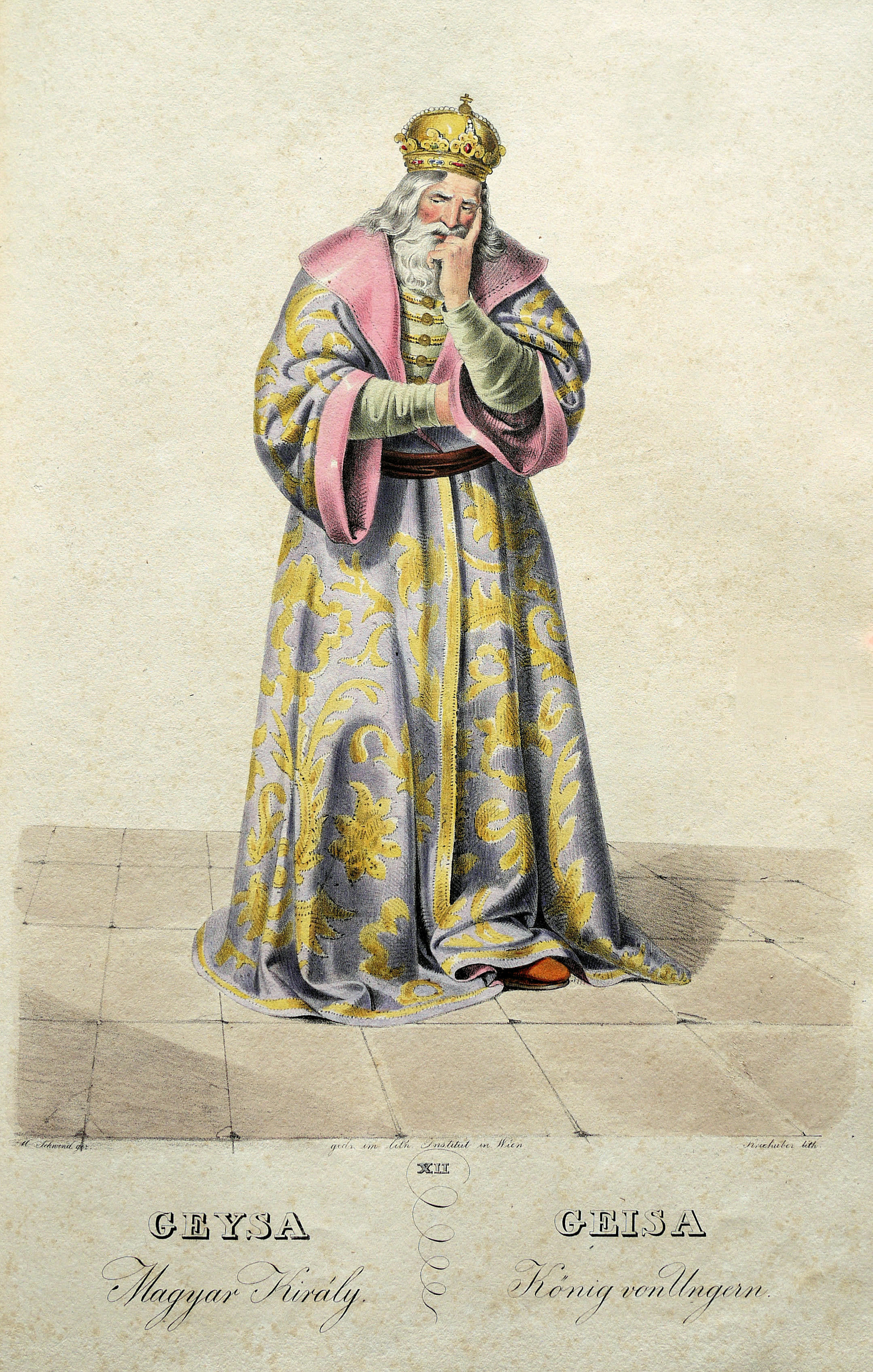 Géza II. (1130-1162), König von Ungarn etc. Lithographie von Josef Kriehuber nach einer Zeichnung von Moritz von Schwind aus Ungerns Erste Heerführer Herzoge und Koenige In einer Reihe von Bildnissen von Bela bis auf Seine Majestät Franz I. Kaiser Von Österreich König Von Ungern &c., &c. Wien : Lithographisches Institut ;ca. 1828.